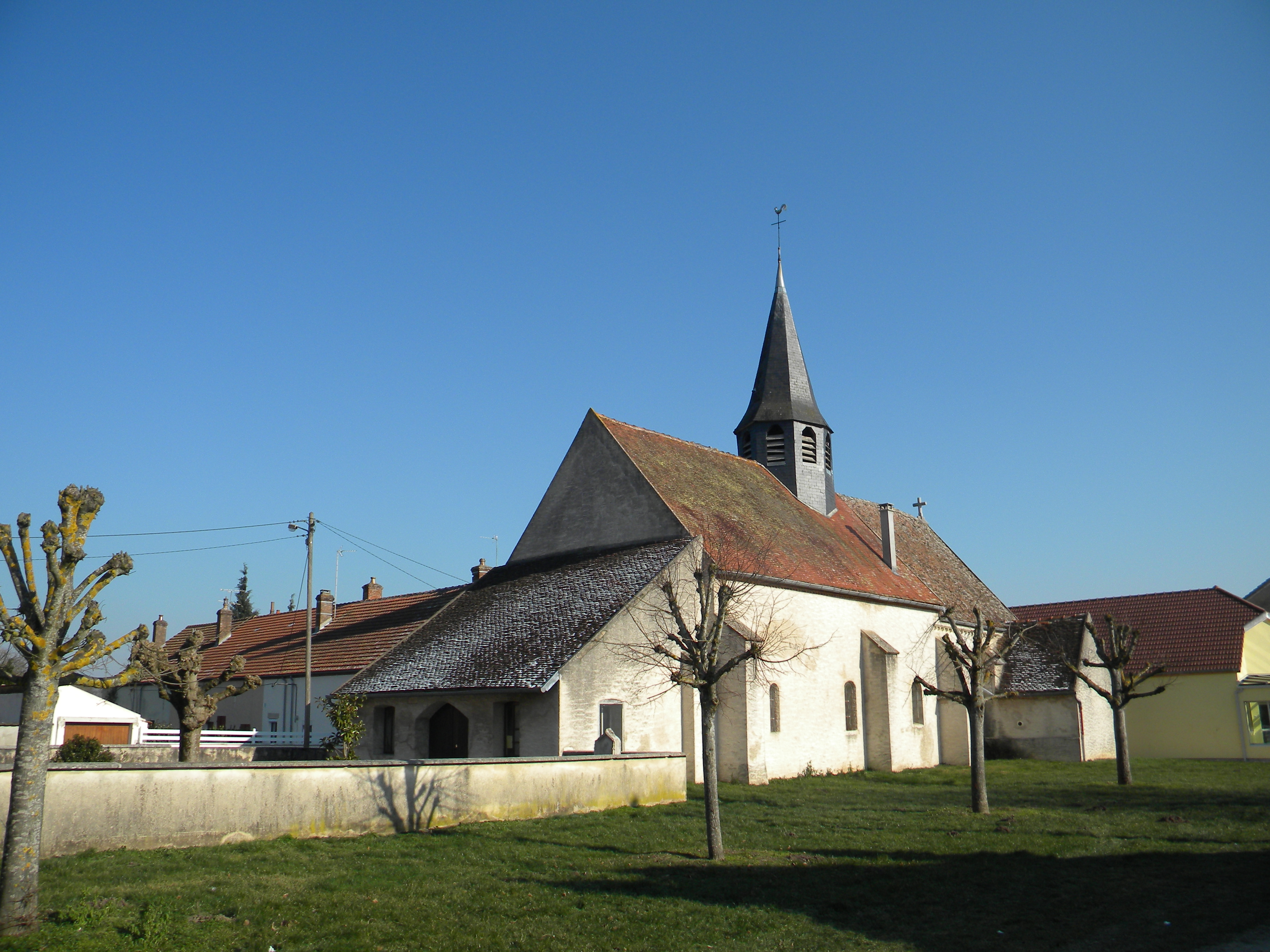 Pouilly-sur-Saône